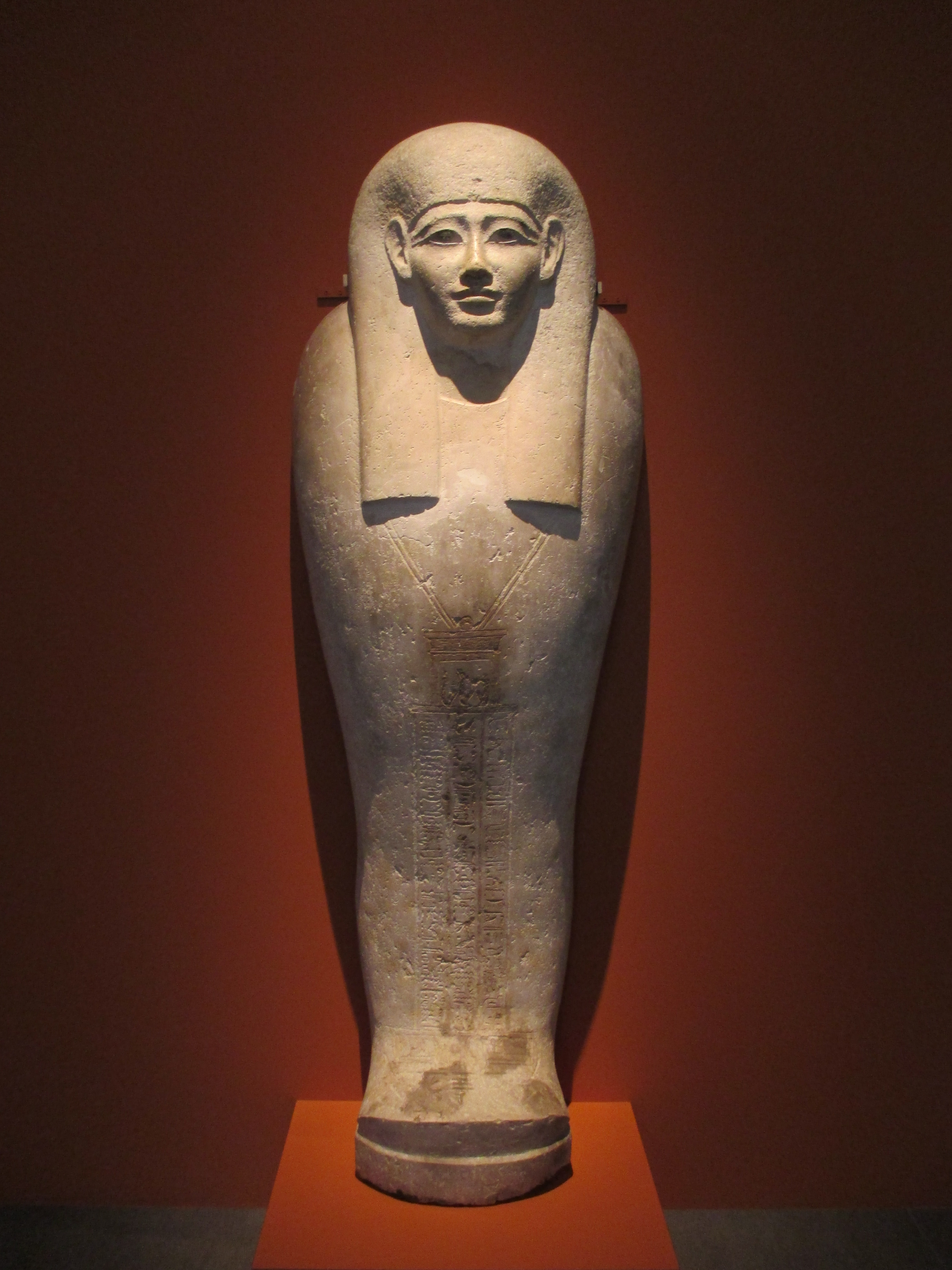 Sarkophagdeckel des Nacht-Neb-ef